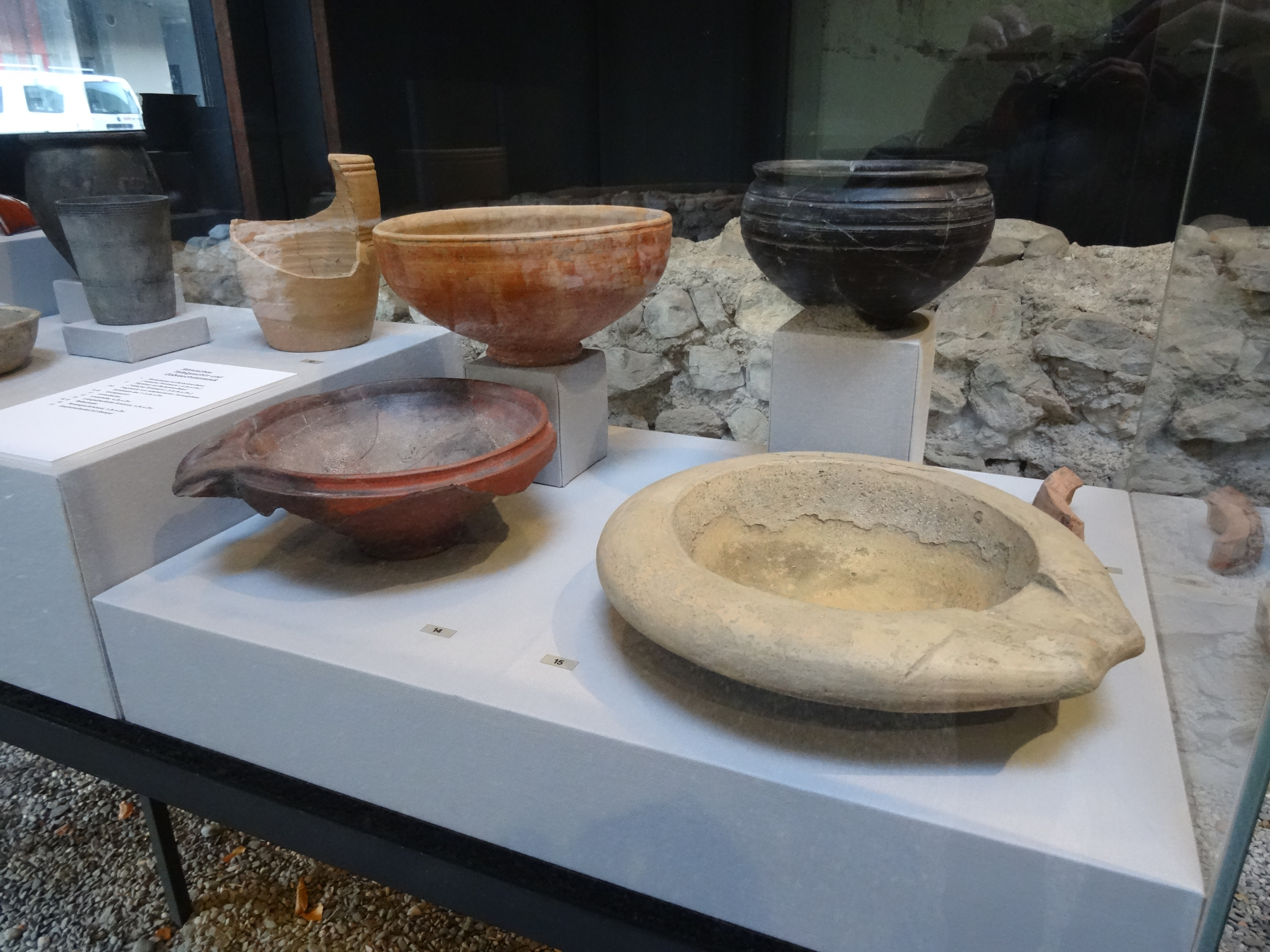 Ausstellung im Schutzbau über der archäologischer Fundstelle im Welschdörfli in Chur